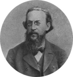 Николай Андреевич Белоголовый (17 октября 1834, Иркутск — 18 сентября 1895, Москва) — русский врач, общественный деятель, писатель, публицист, литератор, автор мемуаров.